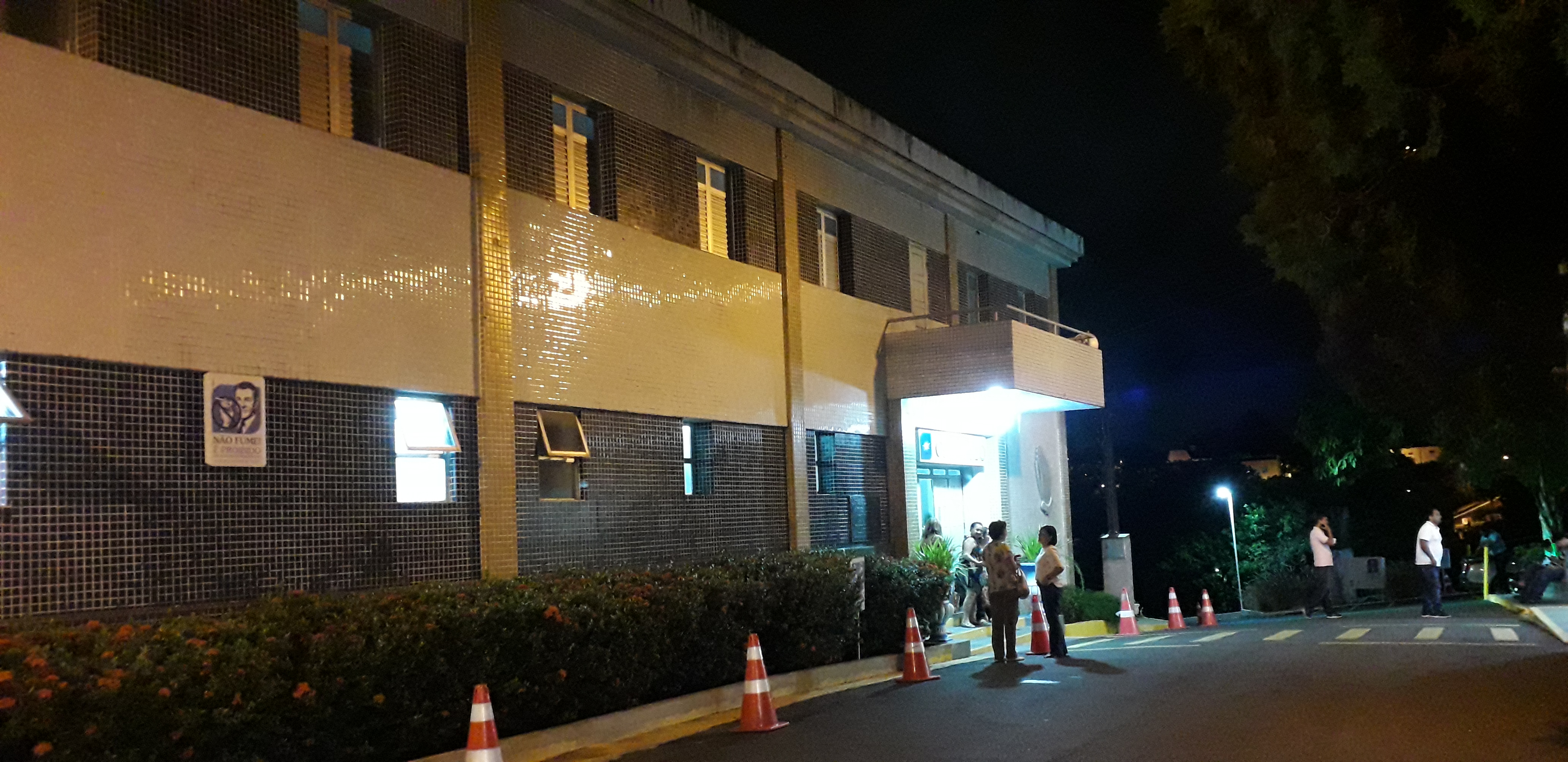 Imagens do Centro espírita Mansão do Caminho em Salvador, Bahia, com palestra de Divaldo Franco e participação do DJ Alok e do médico homeopata Andrei Moreira, presidente da ONG Fraternidade sem Fronteiras